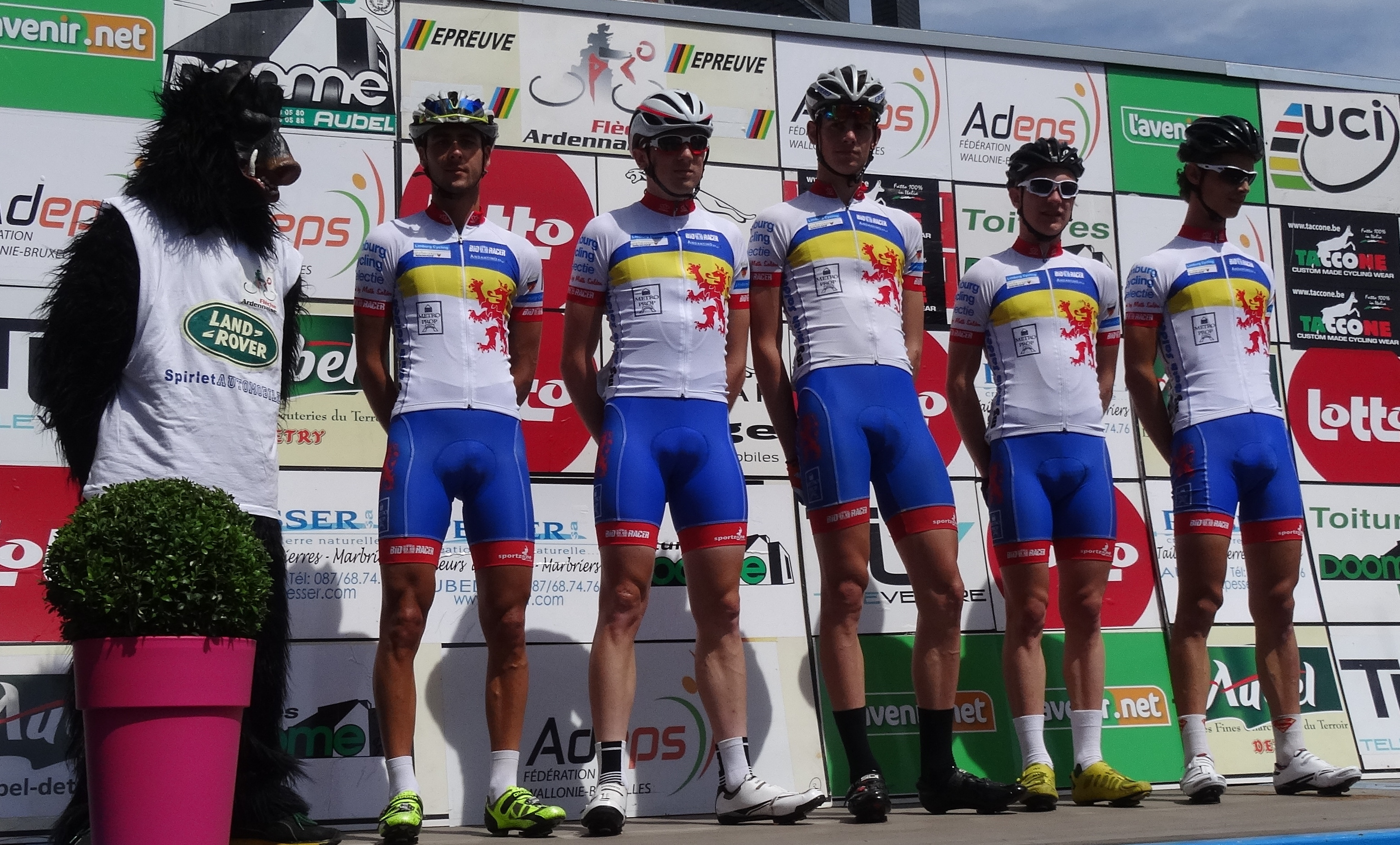 Reportage photographique réalisé le dimanche 22 juin à l'occasion du départ et de l'arrivée de la Flèche ardennaise 2014 à Herve, Belgique.